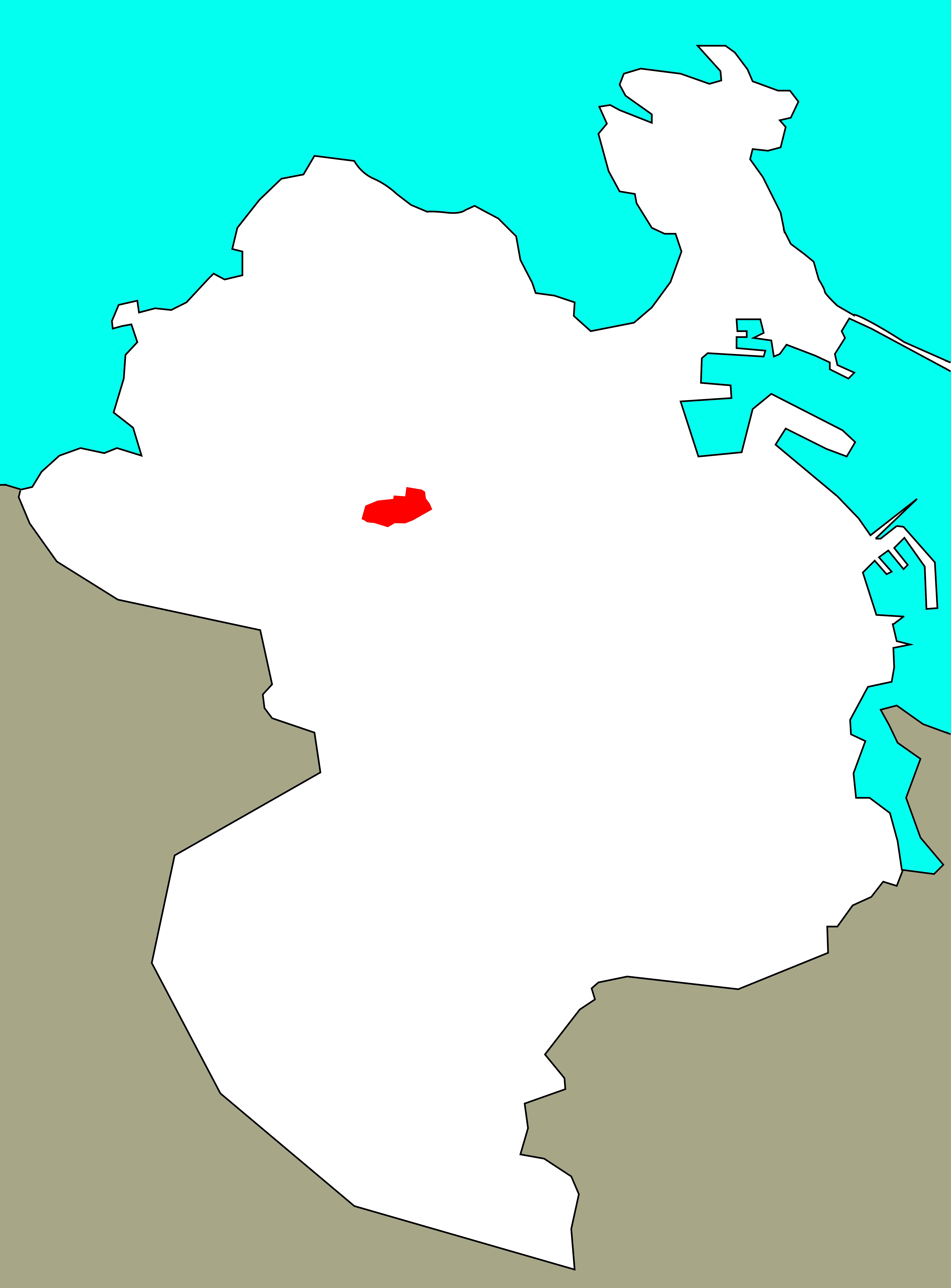 Situación de Cances no concello da Coruña.[1]